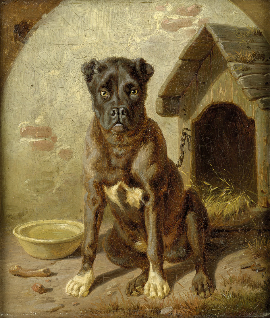 Boxer vor seiner Hütte